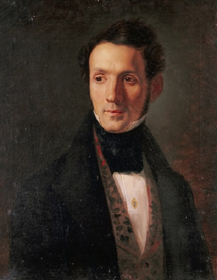 Autoritratto, olio su tela, 66 x 52 cm., Museo Palazzo Bonaccorsi, Macerata